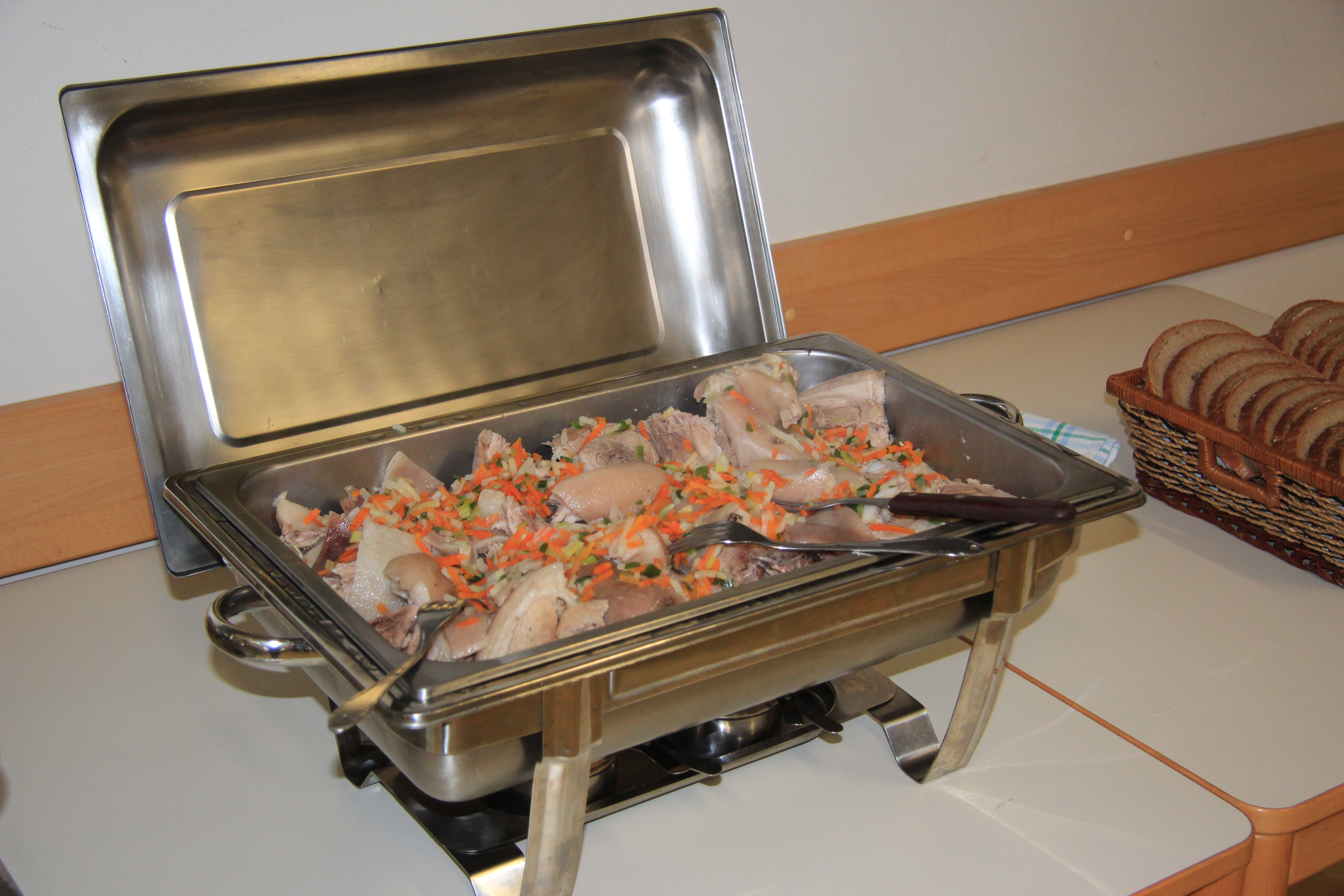 Warmhalten von Kesselfleisch mit Sauschädel in einer Bain-Marie